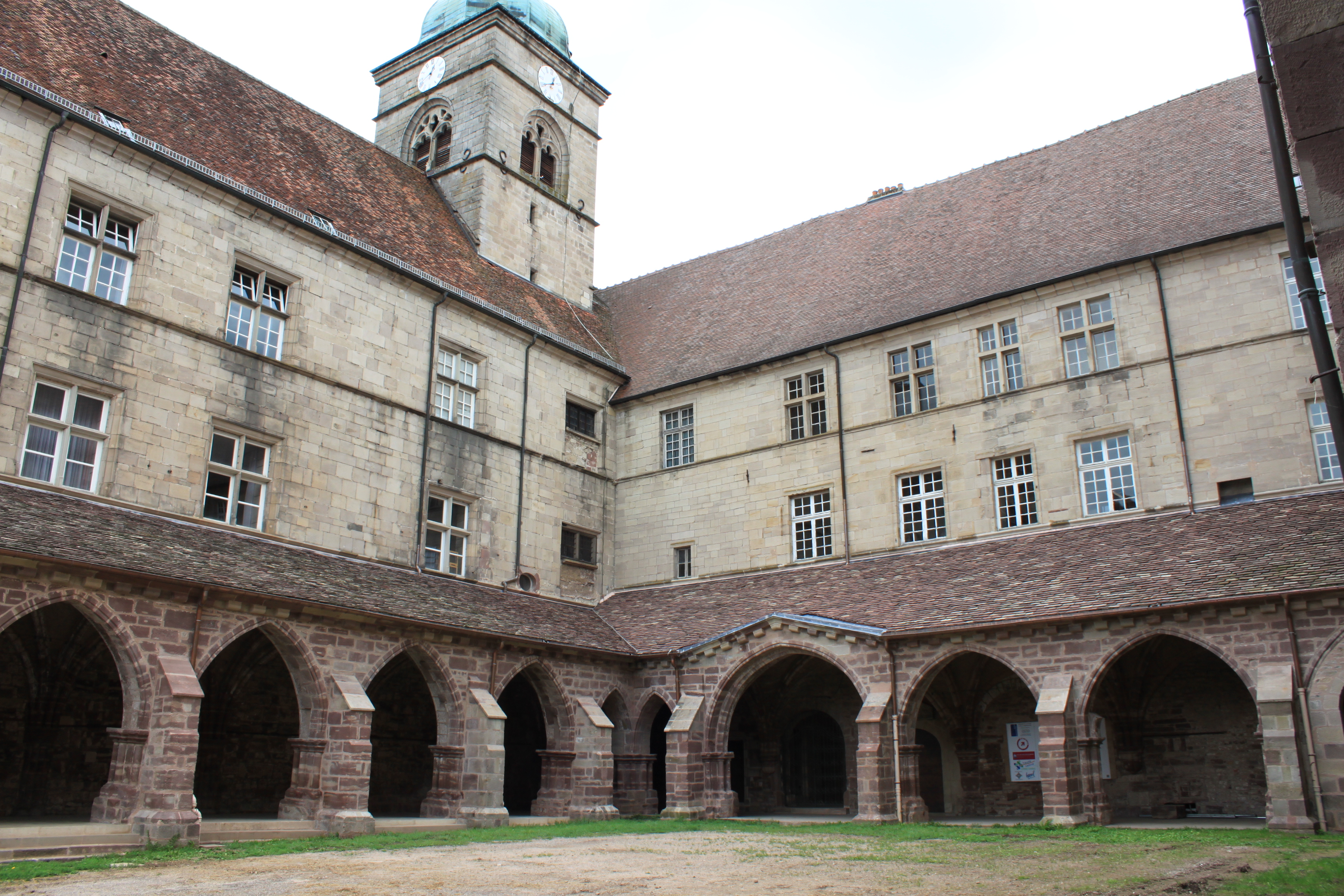 Luxeuil-les-Bains, France